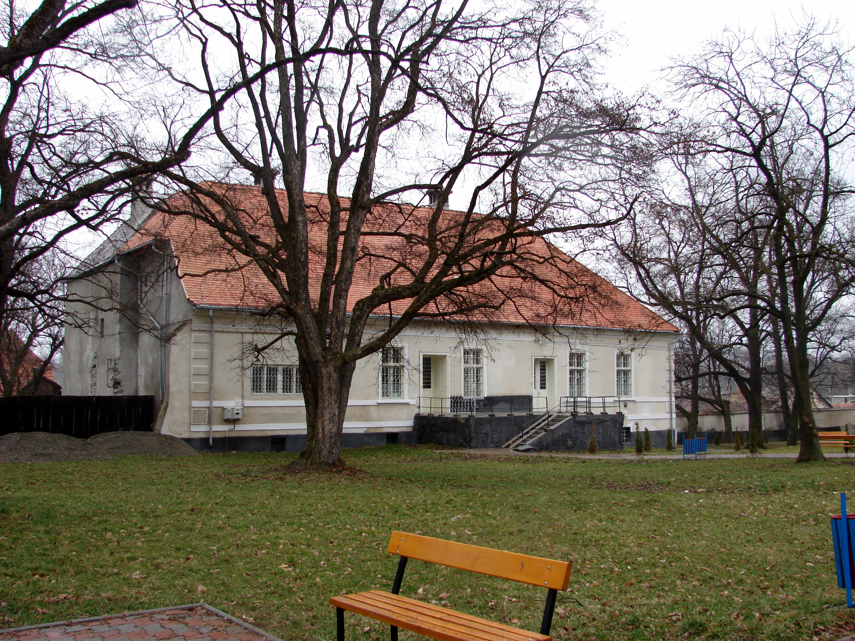 Ansamblul castelului Haller